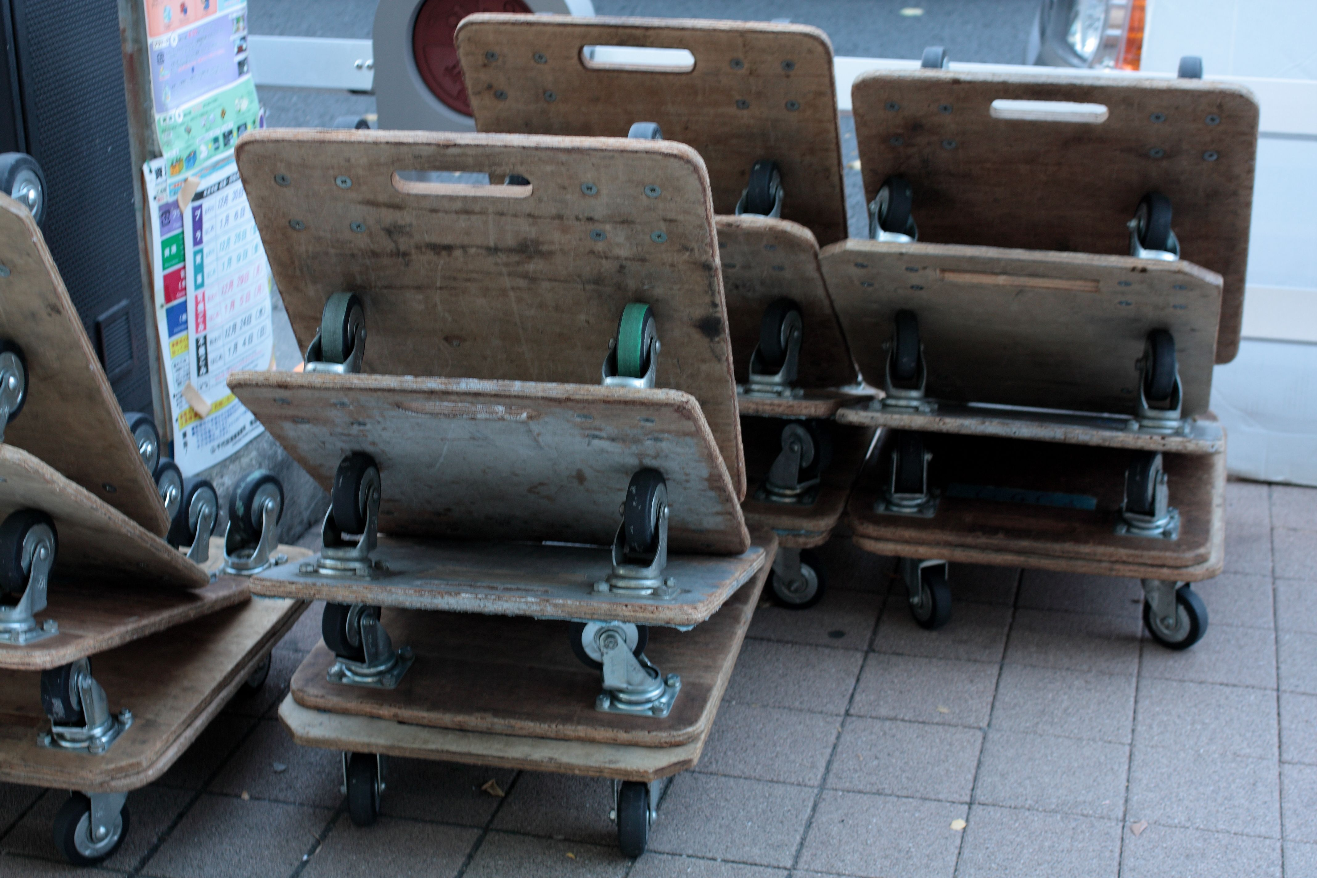 店舗移転っぽく、引っ越し屋さんの台車がたくさんあった